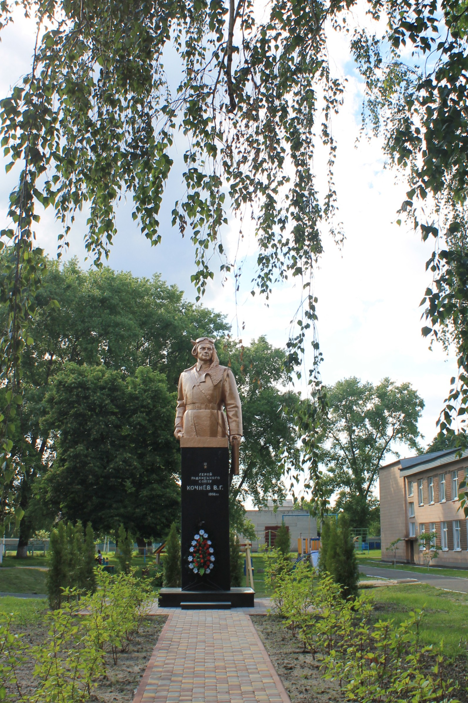 село Велика олександрівка Бориспільського району Київської області